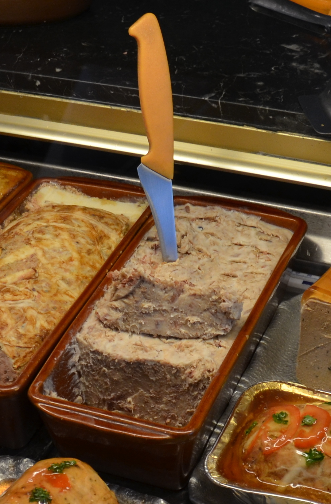 Étal de charcutier-traiteur.